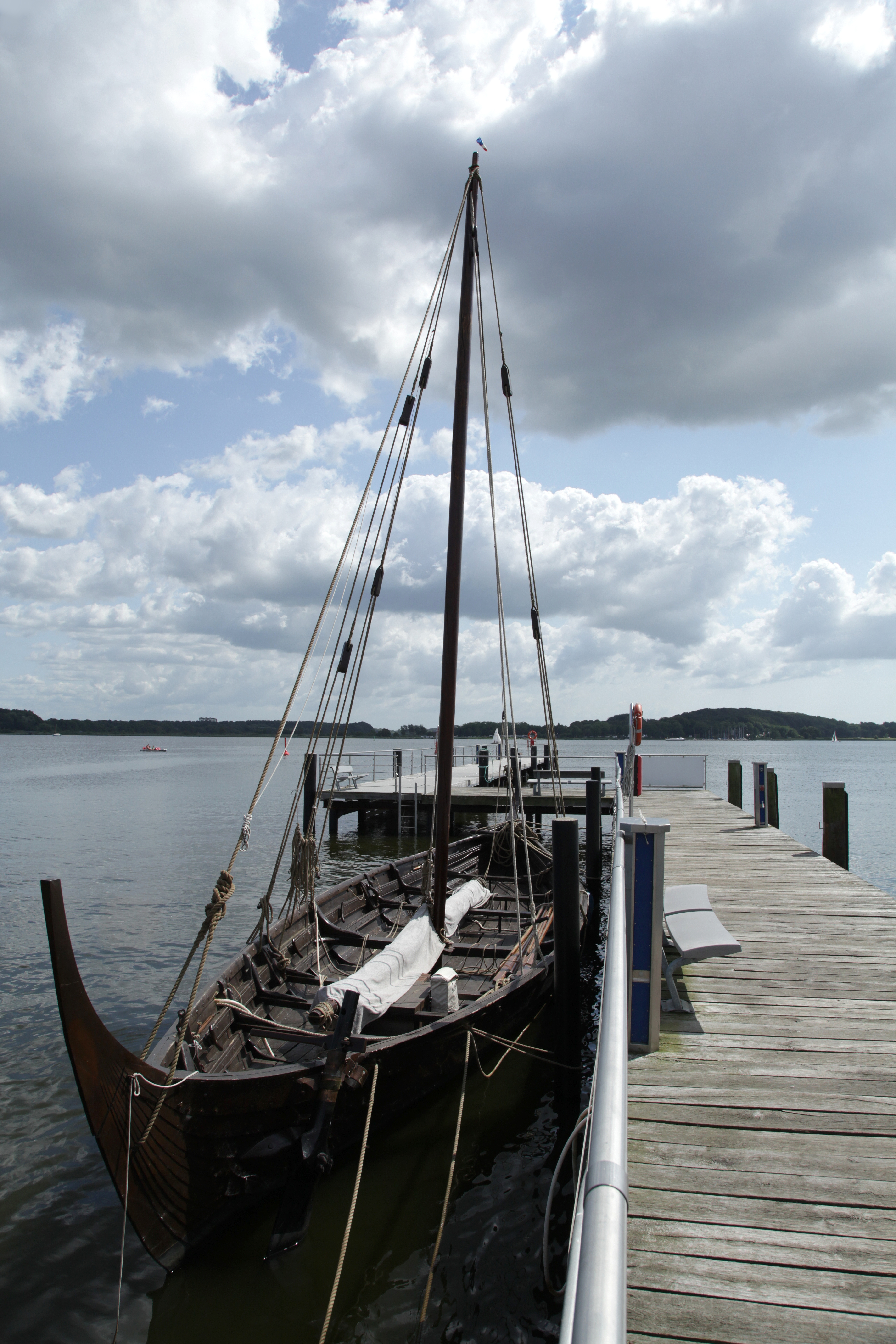 Die Sigyn an der Fahrgastbrücke, Am Hafen in Schleswig